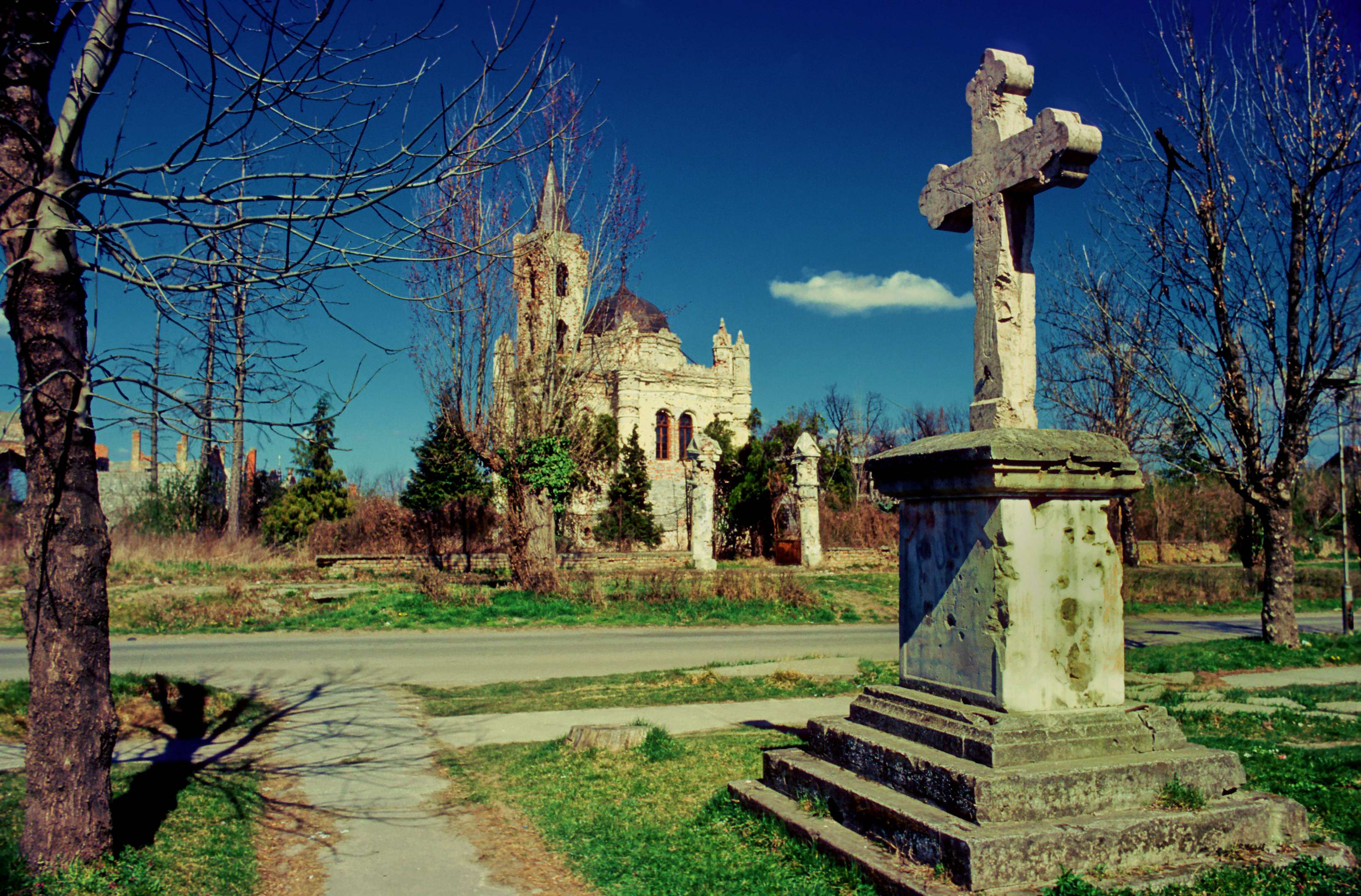 Chuch, Vukovar, Croatia